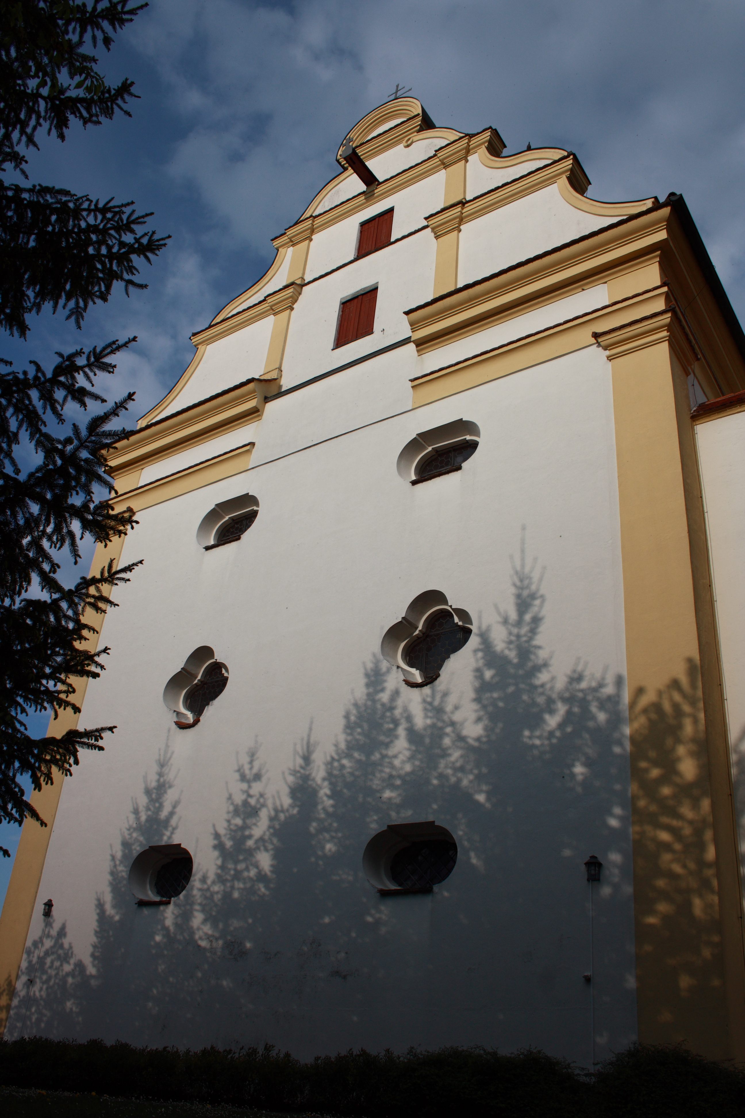 Katholische Pfarr- und Wallfahrtskirche St. Jakobus und Laurentius in Biberbach im Landkreis Augsburg (Bayern), Fassade